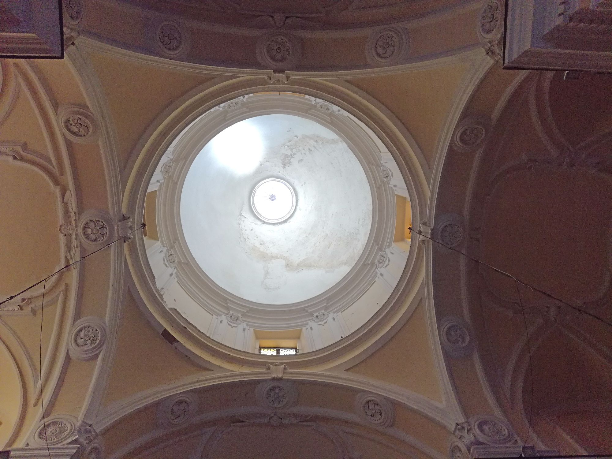 Cupola Santa Maria della Vittoria